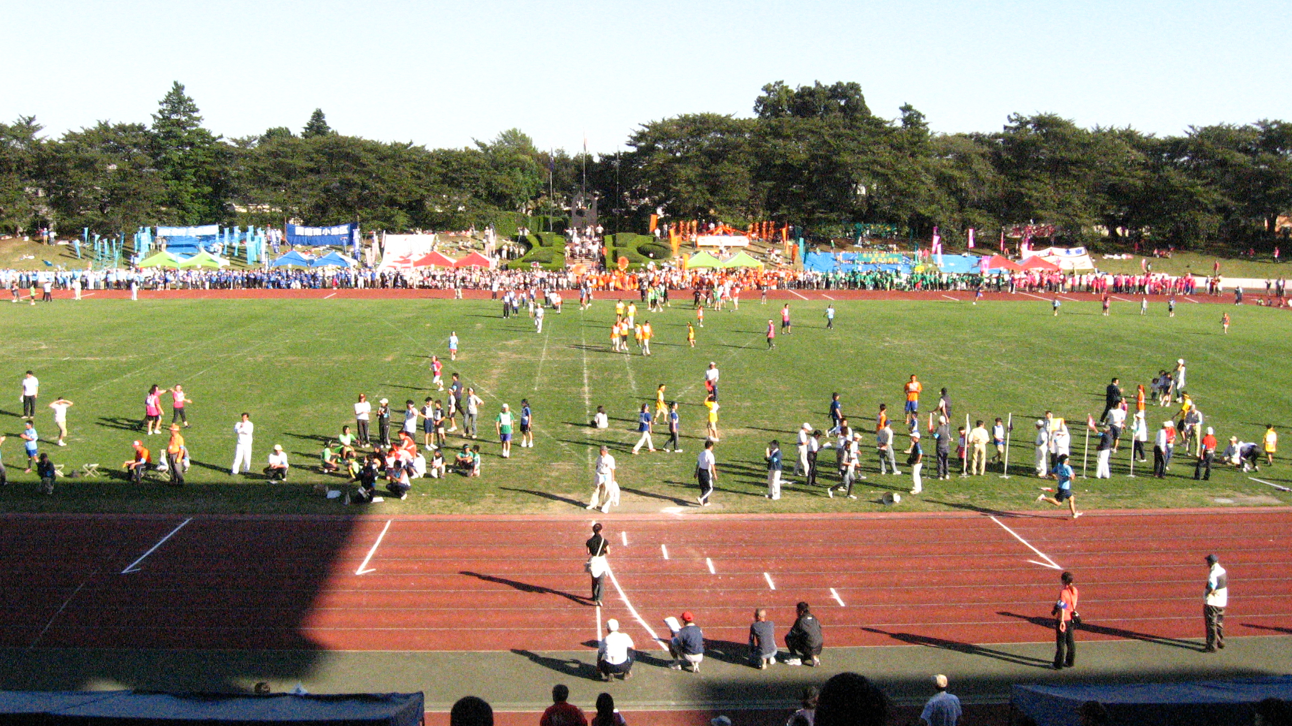 第17回武蔵野市民大運動会の模様（2006年10月9日）